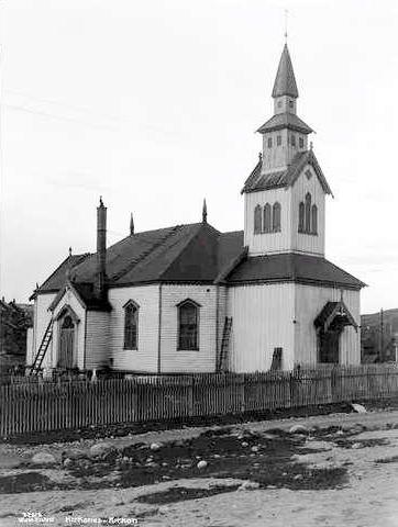 Kirkenes gamle kyrkje (1862-1944)